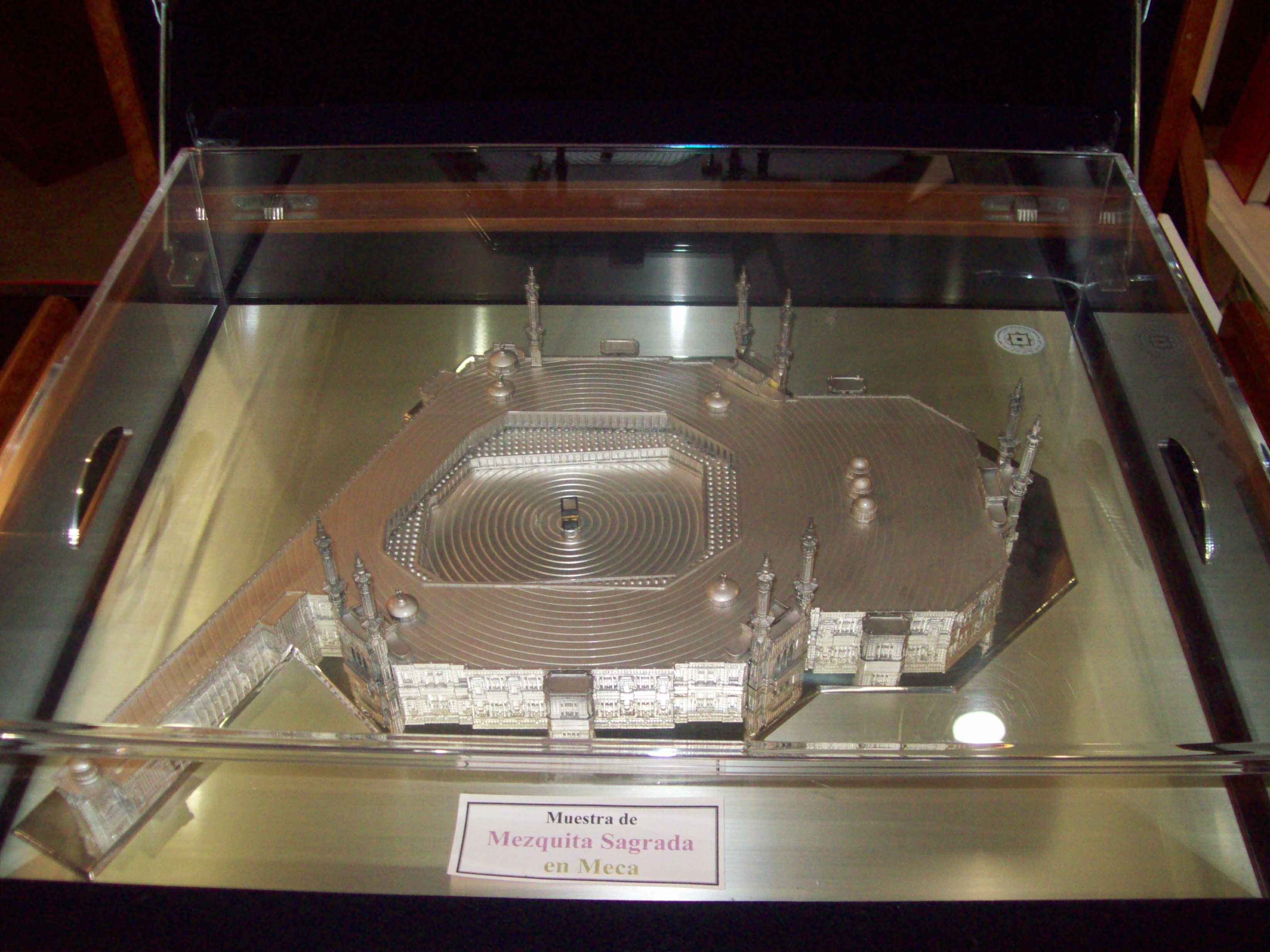 Reproducción de la Mezquita Sagrada en Meca